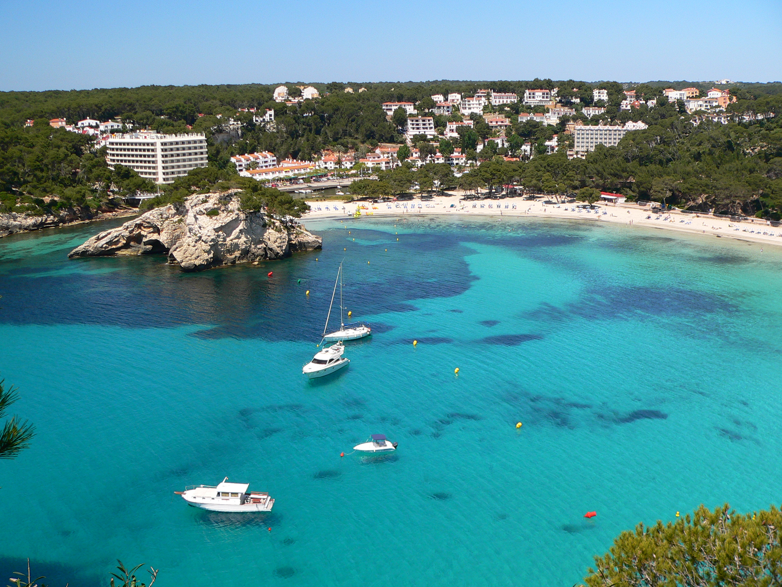 Cala Galdana, Menorca.